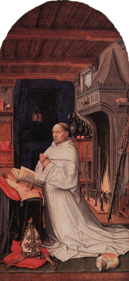 Portrait of Abbot Christiaan de Hondt, oil on panel, Koninklijk Museum voor Schone Kunsten, Antwerp. Right half of a diptych.